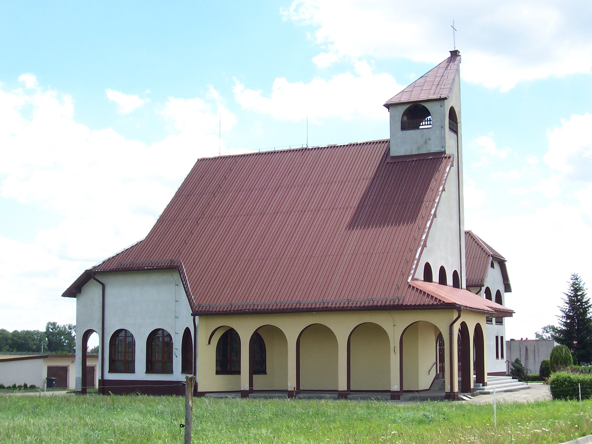 Kościół pw św. Jana Nepomucena w Lisowicach